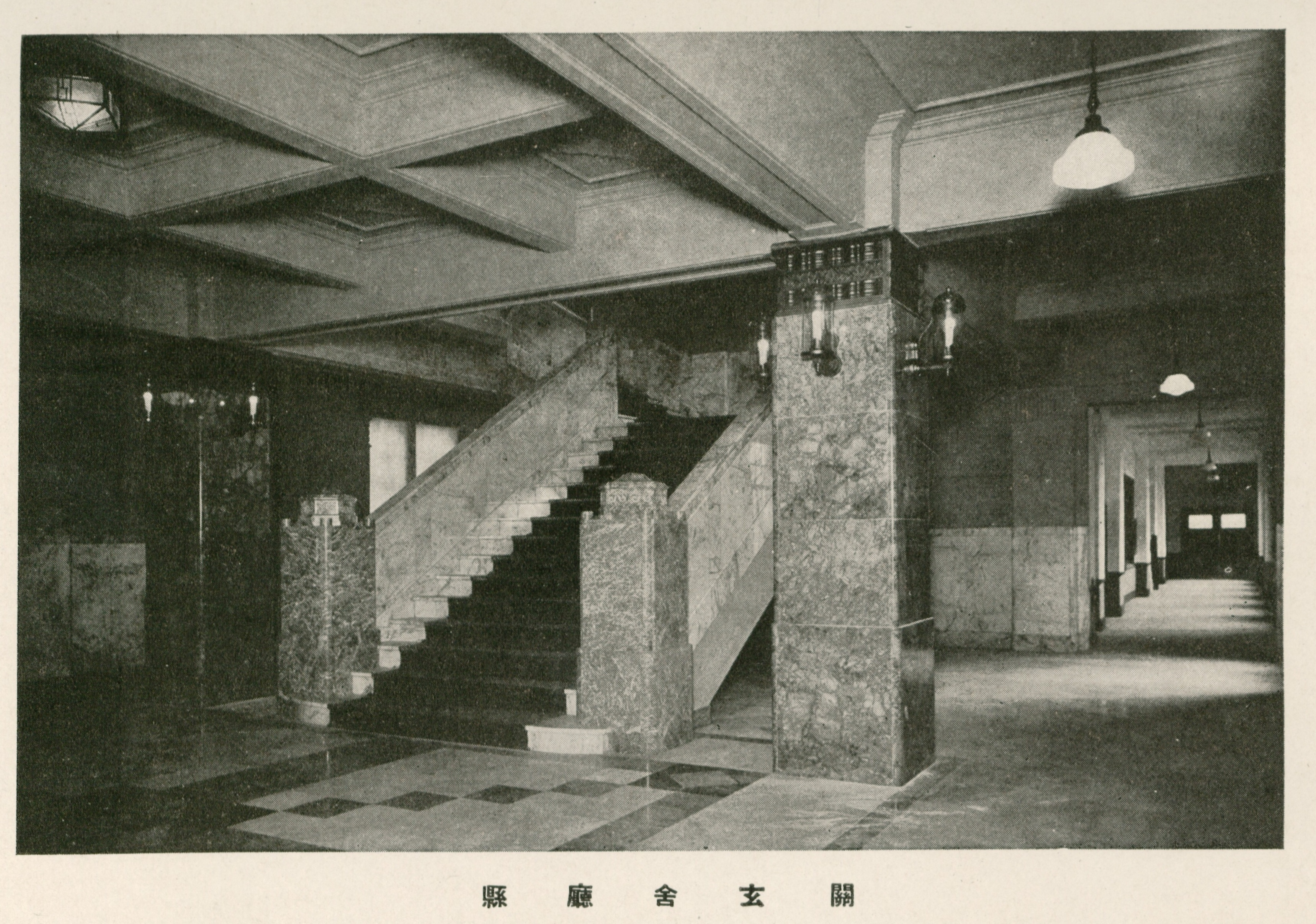 山梨県庁舎別館 (旧本館)玄関